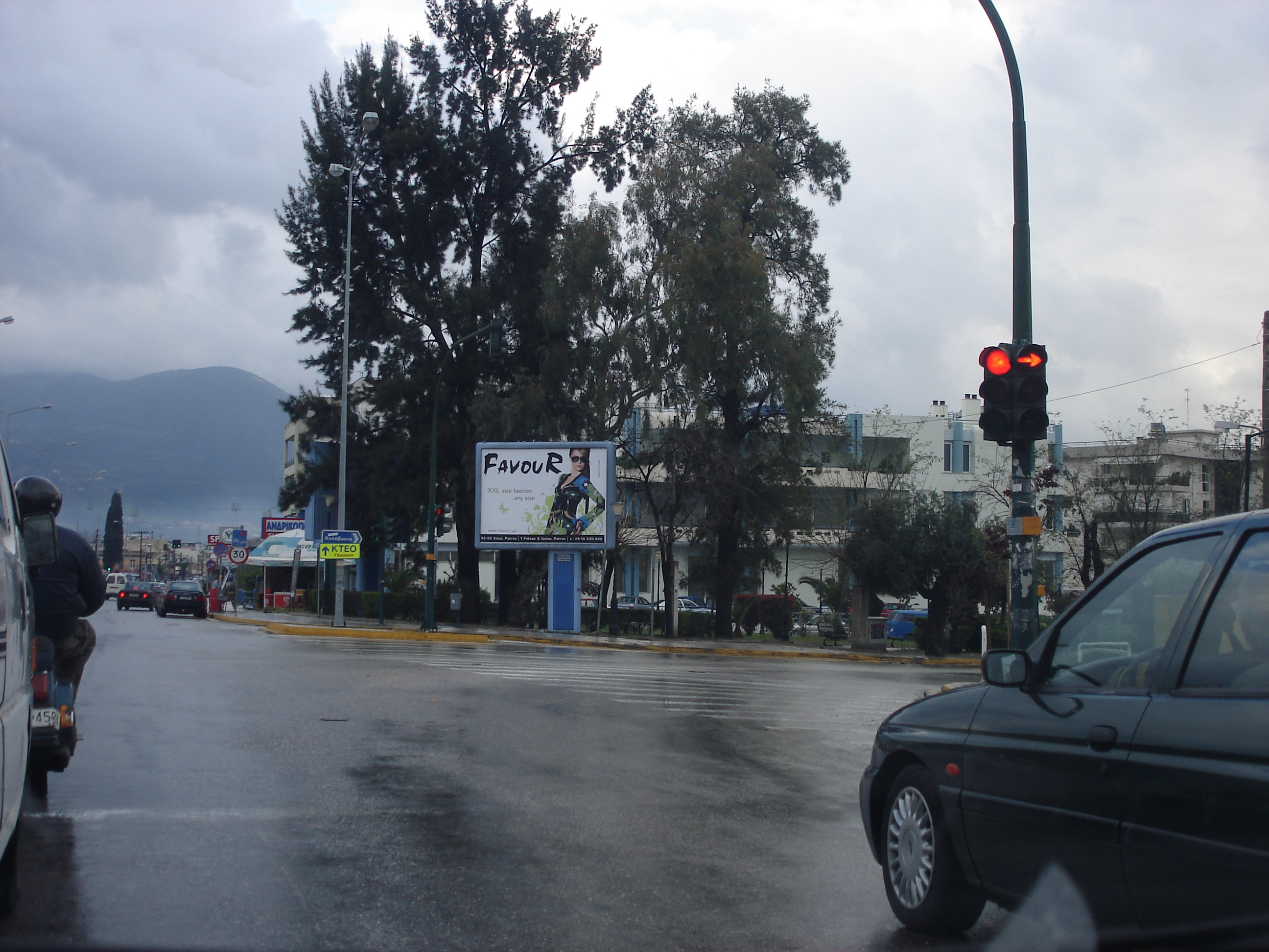 Drosia Patra Greece